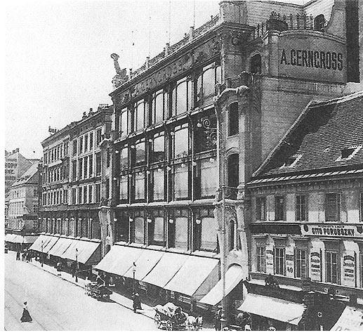 Gerngross department store in Vienna